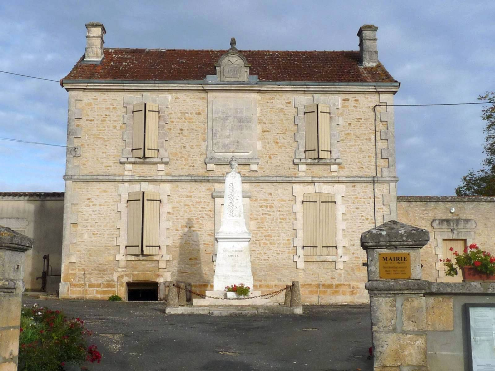 mairie de Ventouse, Charente, France